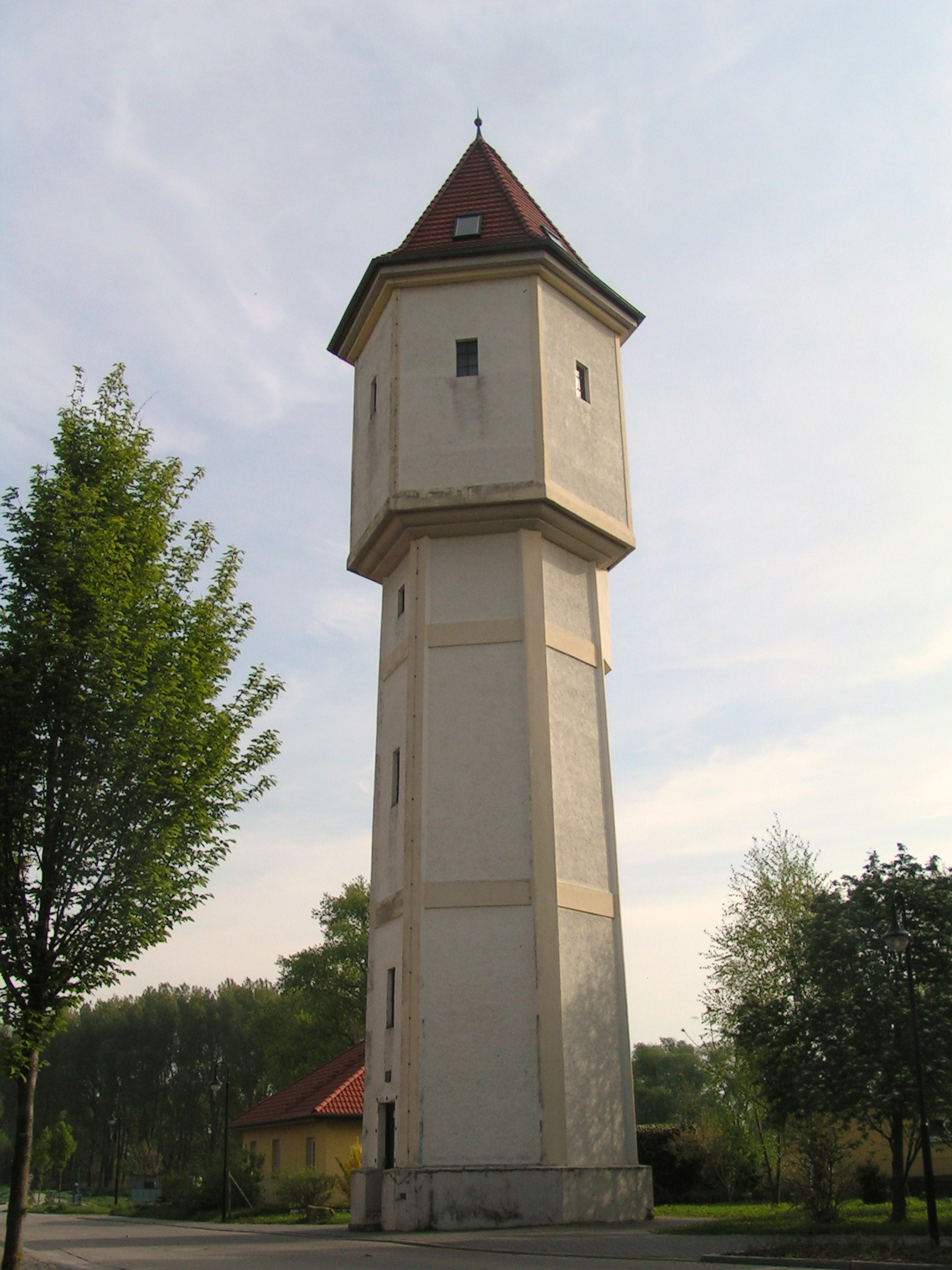 historischer Wasserturm in Athensleben